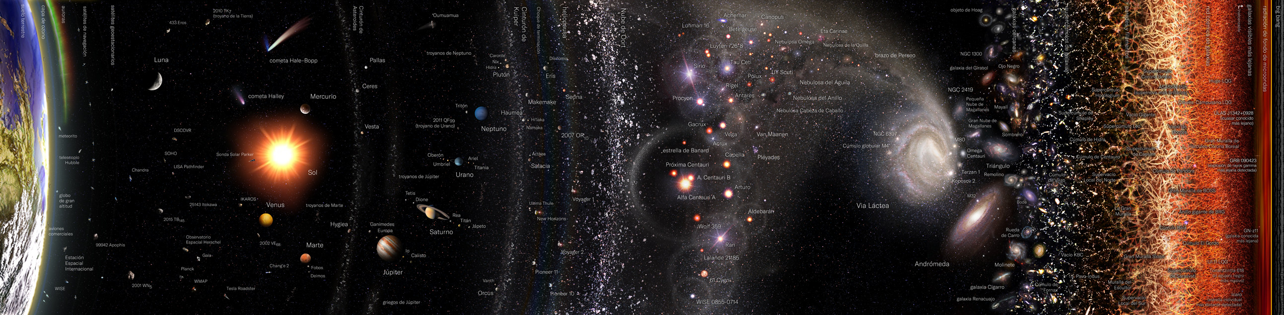 Mapa del universo observable. De izquierda a derecha, los cuerpos celestes conocidos están dispuestos de acuerdo con su proximidad a la Tierra. En el borde derecho encontramos los objetos más distantes observados que son GRB, quásares, galaxias y la radiación cósmica de fondo de microondas. Los cuerpos celestes aparecen con su tamaño agrandado para apreciar su forma.